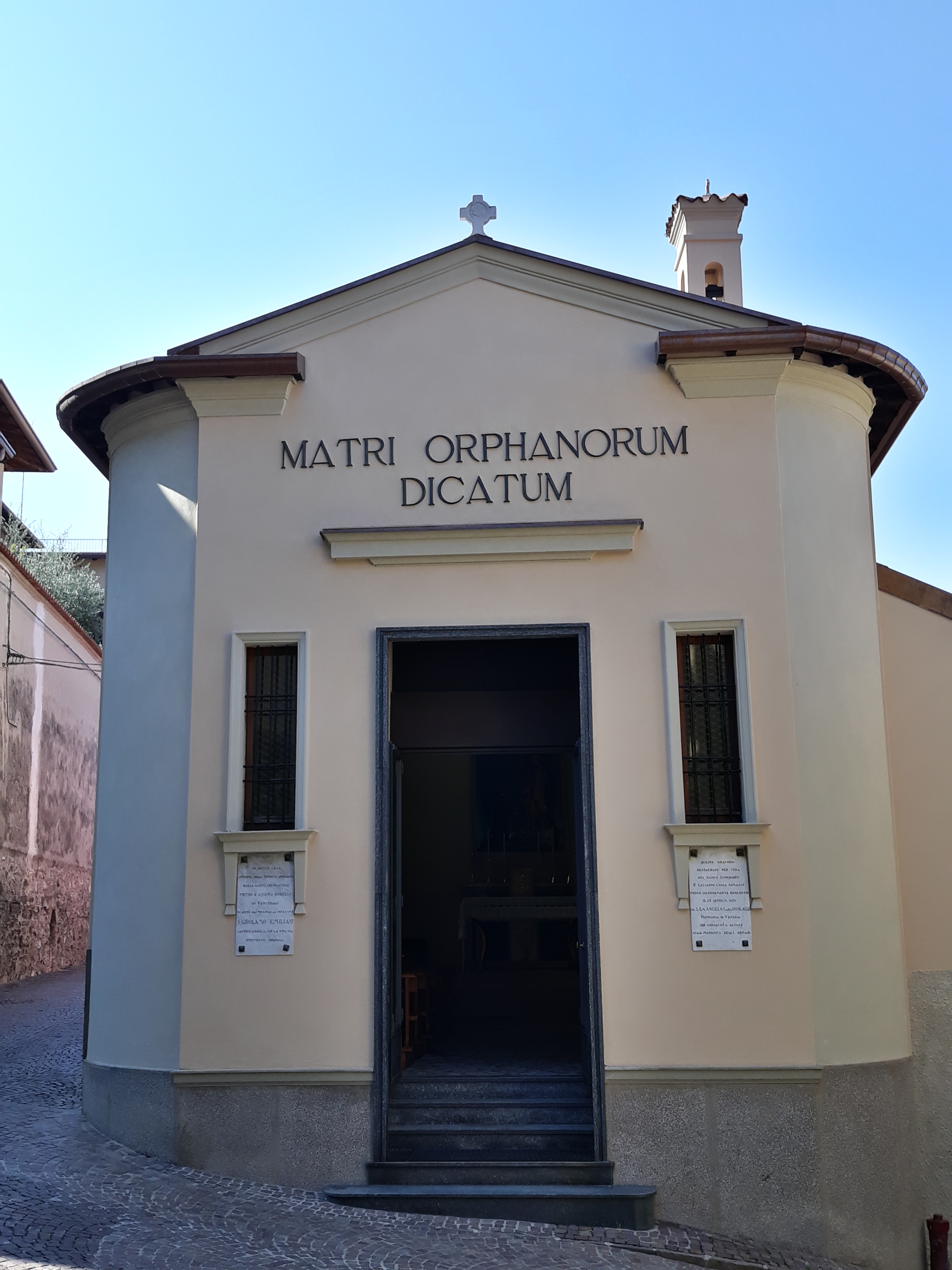 Foto della chiesa dopo i restauri del 2018